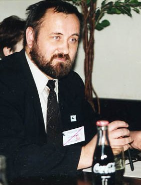 Валеры Буяк на прэс-канферэнцыi па "Мiстэр Асiлак Сэкай" 22.02.1996